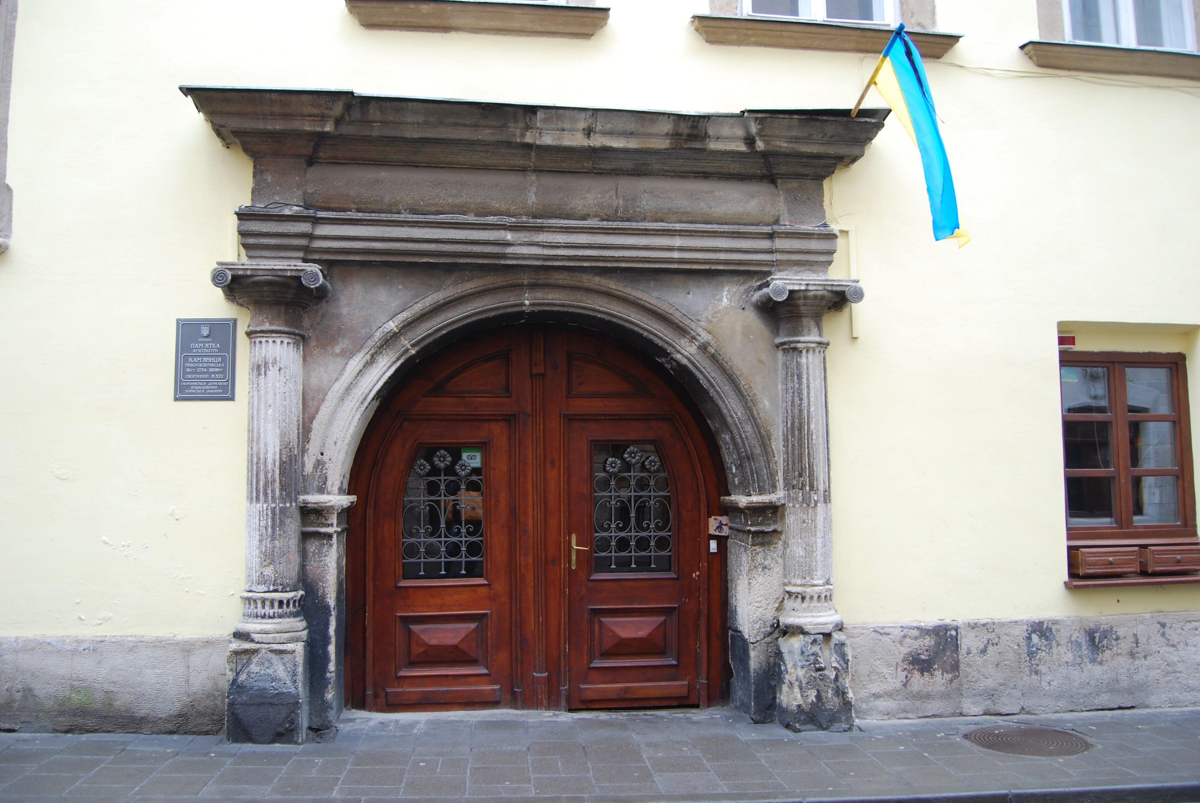 житловий будинок, Львів, Вірменська, 20